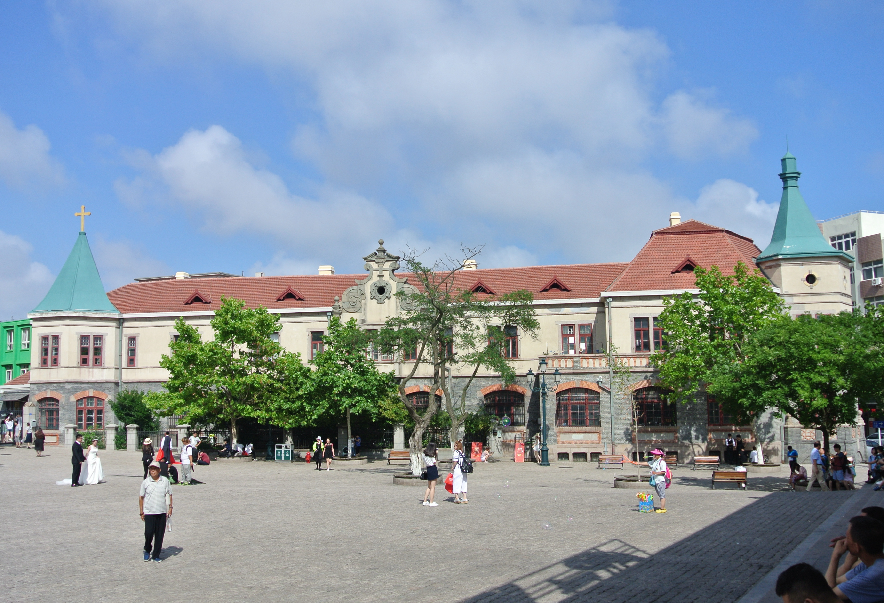 青岛圣言会旧址西翼